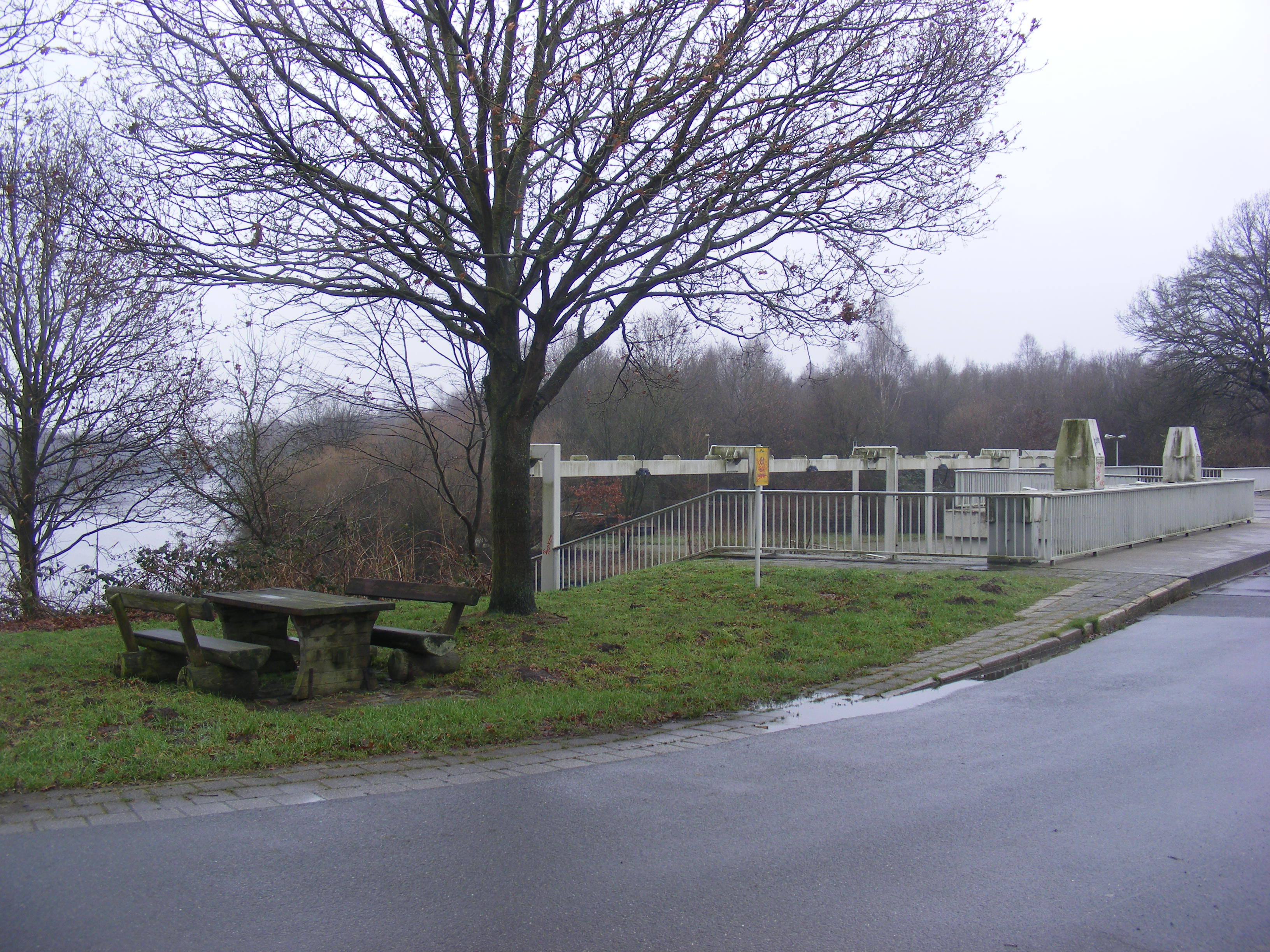 neues Schöpfwerk Wasserhorst mit Rastplatz und Blick uf das Maschinenfleet